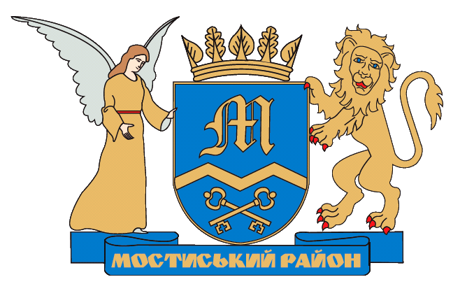 Herb rejonu mościskiego